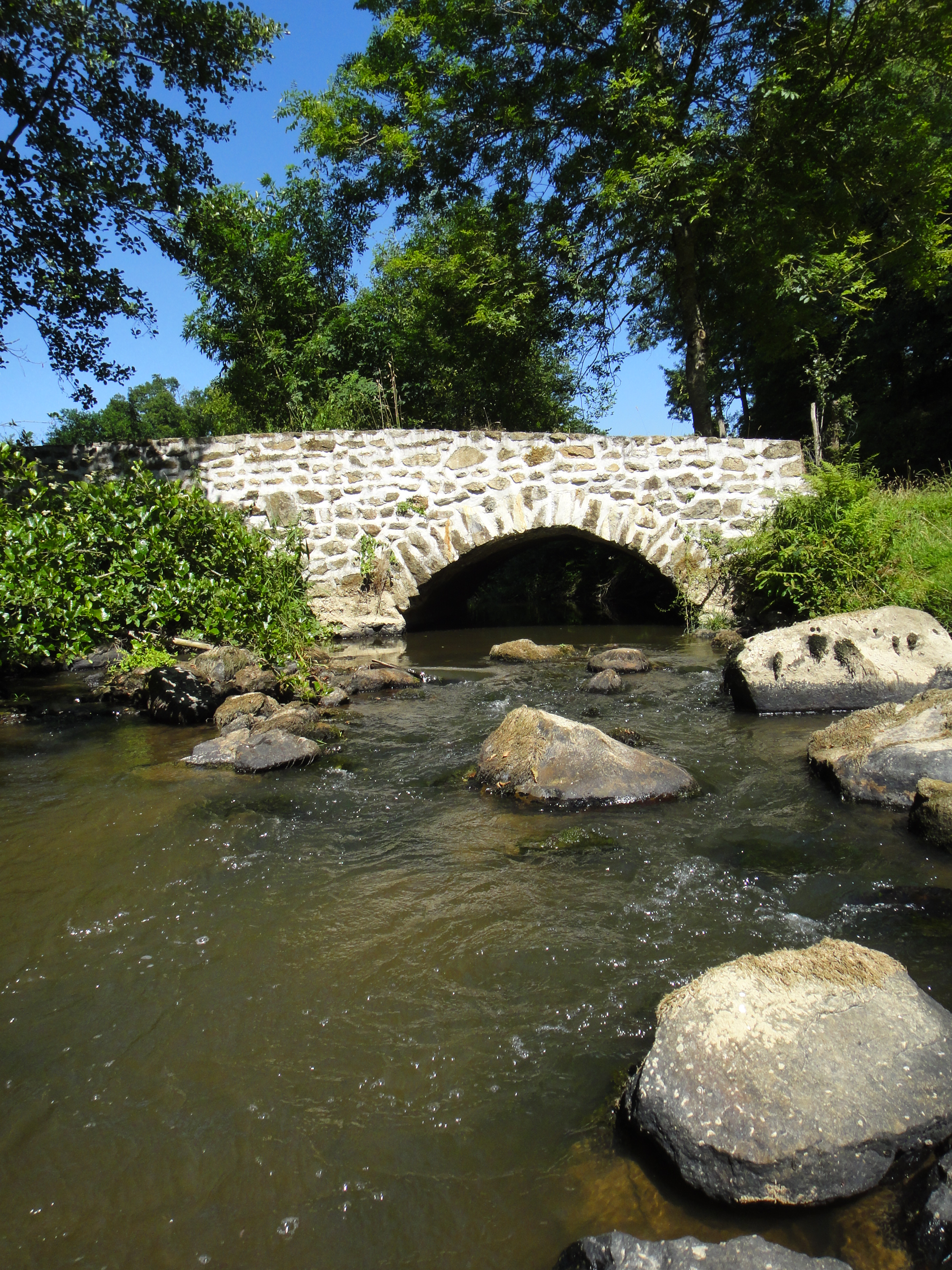 Rivière l'Aron au pont de Buchaud.